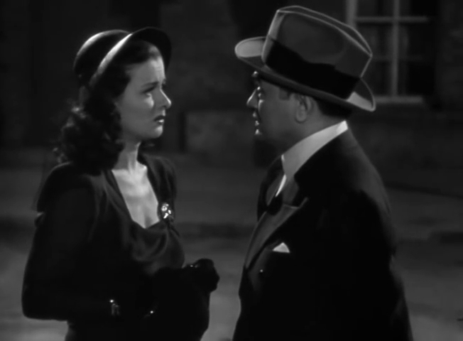 「飾窓の女」におけるエドワード・G・ロビンソンとジョーン・ベネット